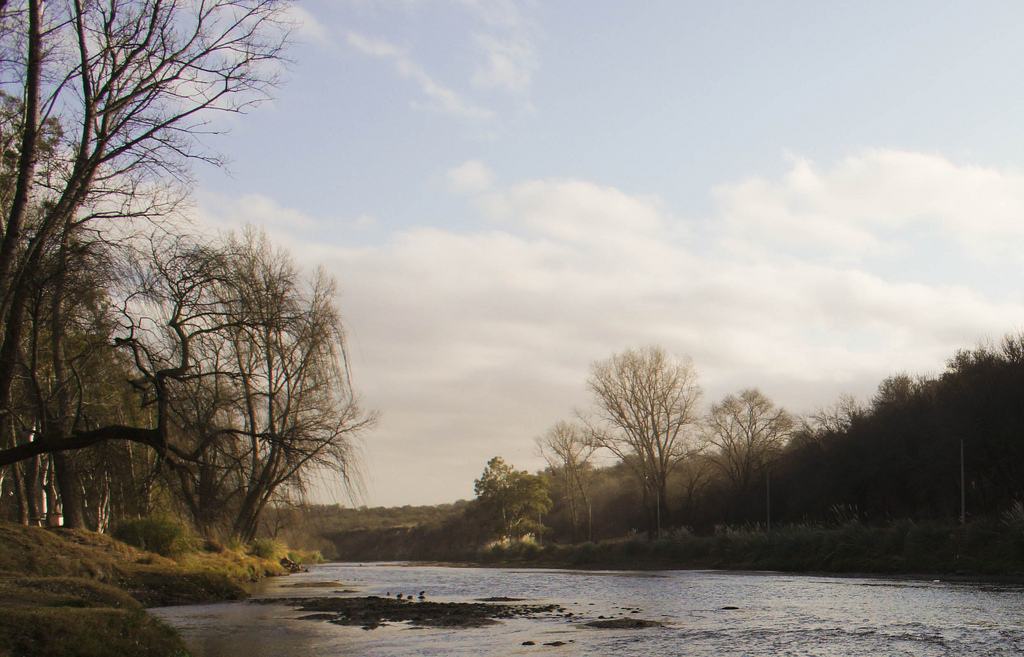 vista del balneario municipal de la cuidad de Río Tercero, Córdoba, Argentina